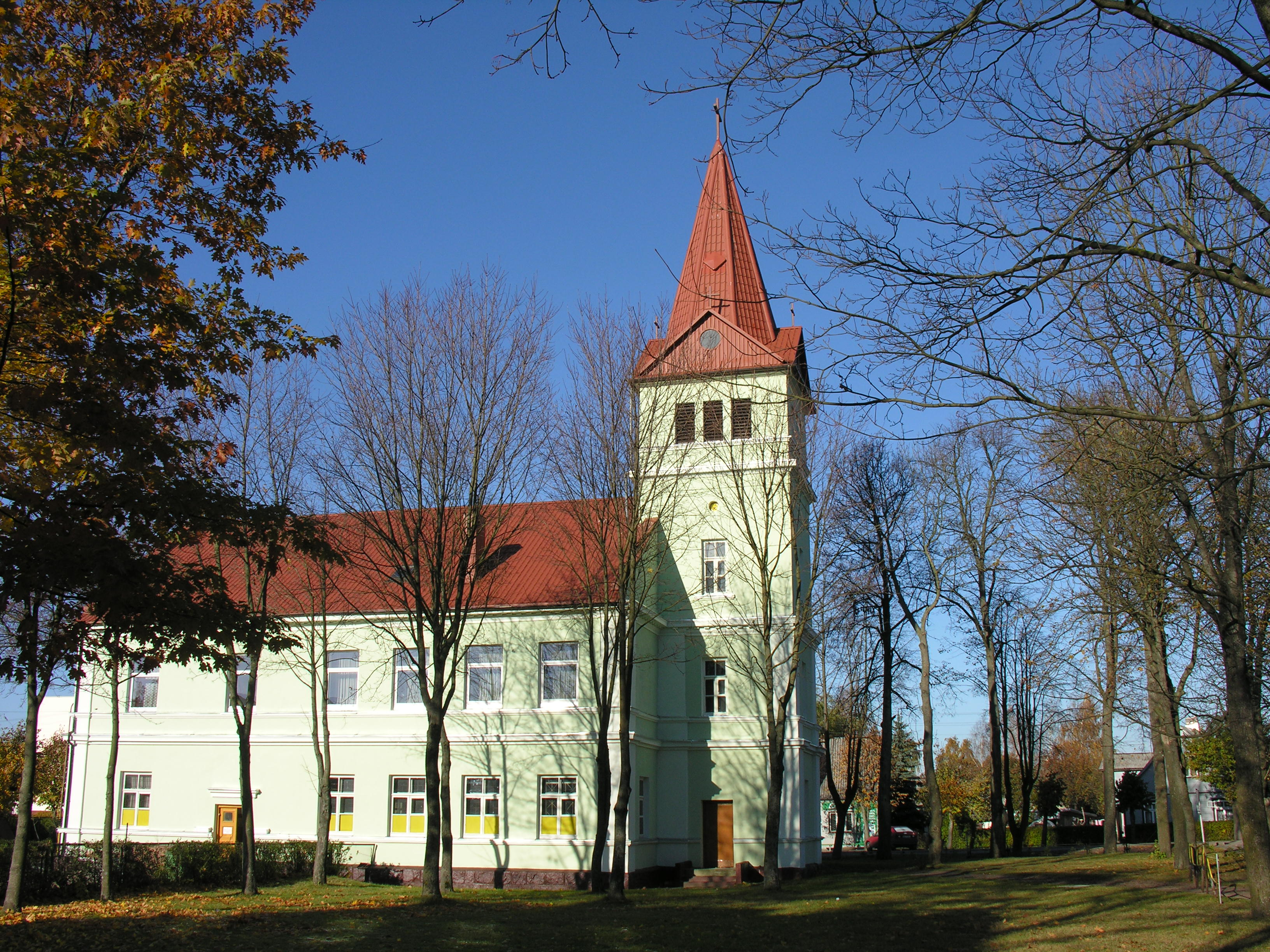 Mažeikių liuteronų bažnyčia